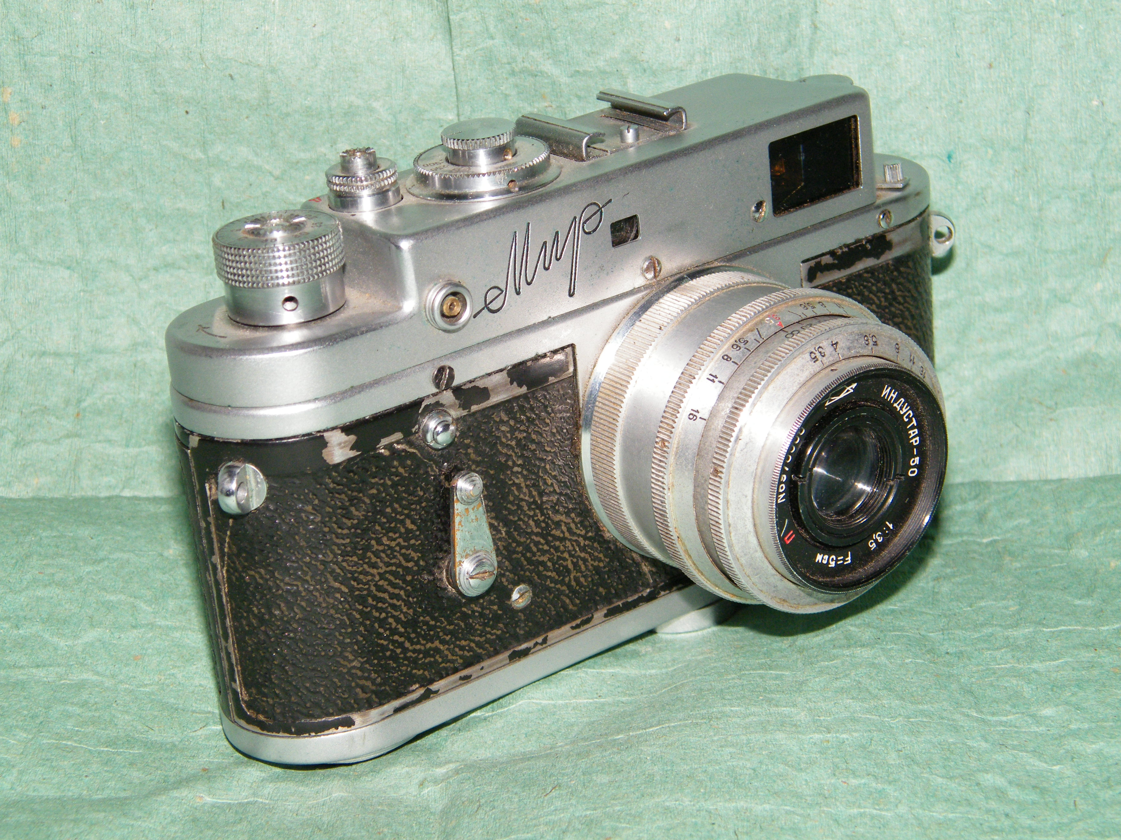 Фотоаппарат Мир (КМЗ)